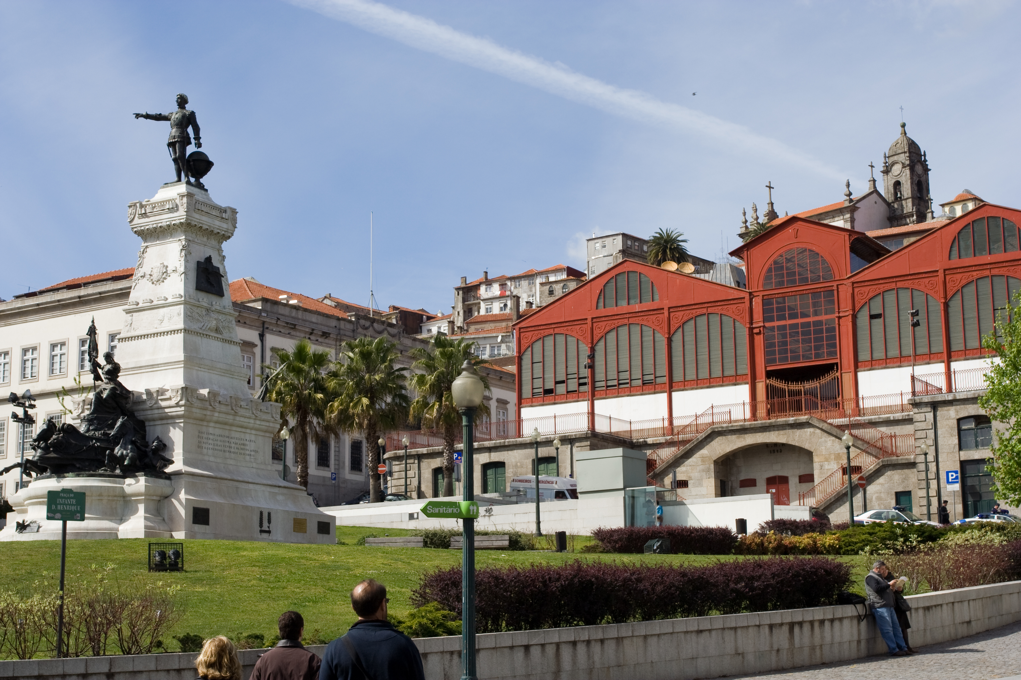 Praça Infante Dom Henrique